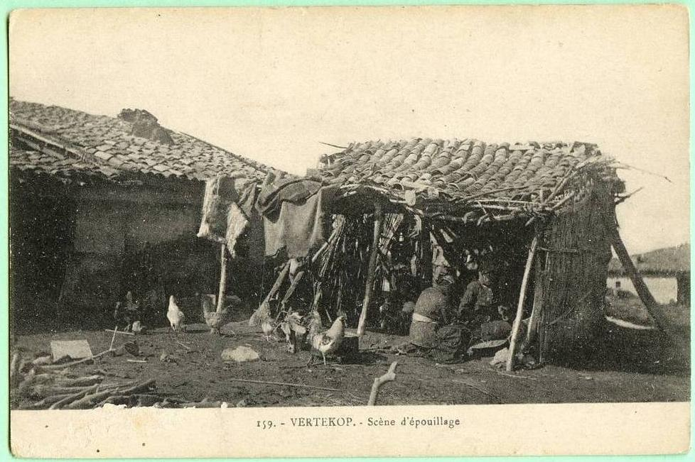 Въртокоп през Първата световна война